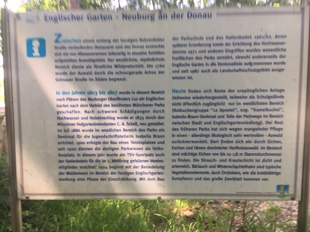 Infotafel